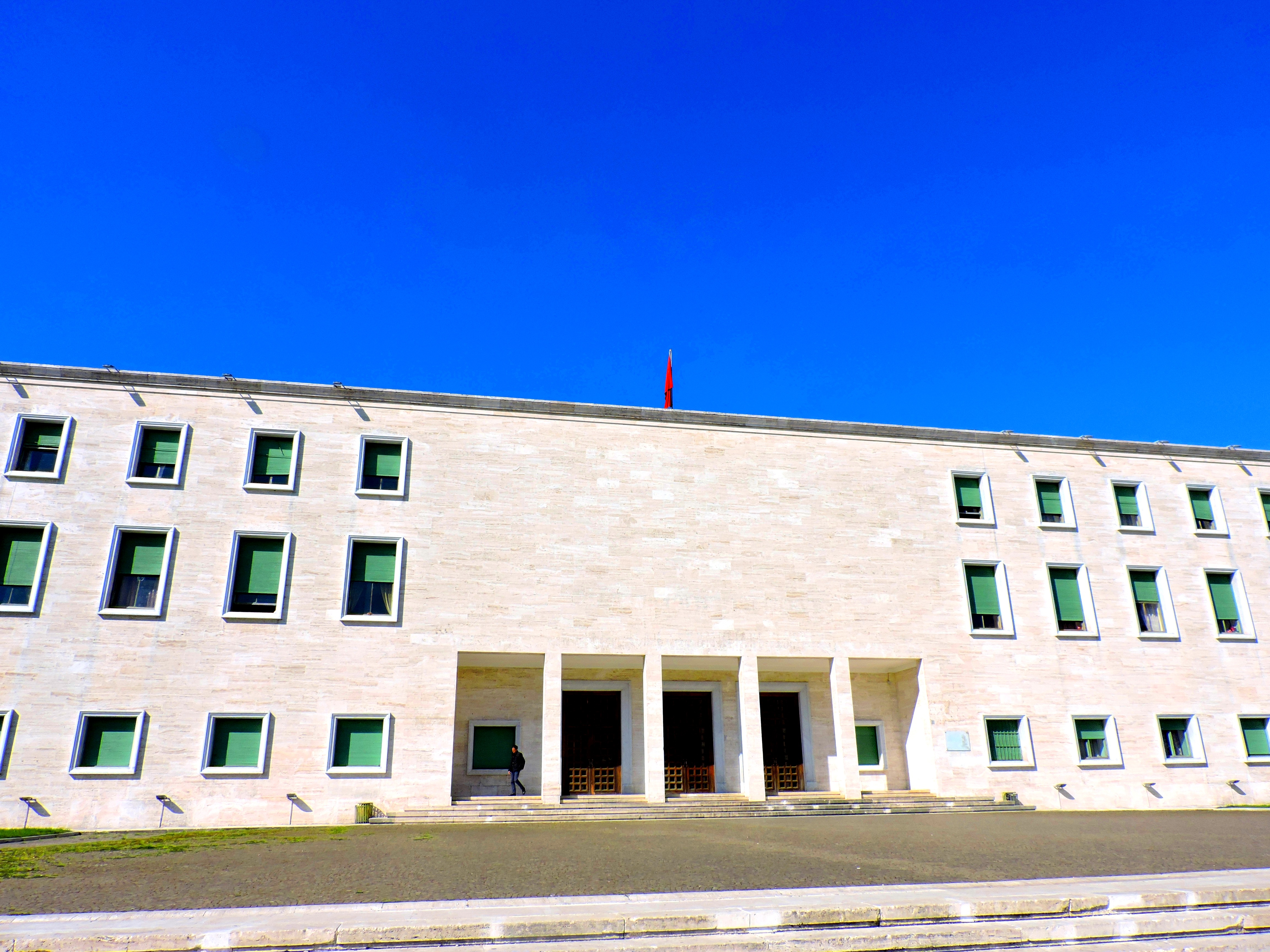 Akademia e Arteve